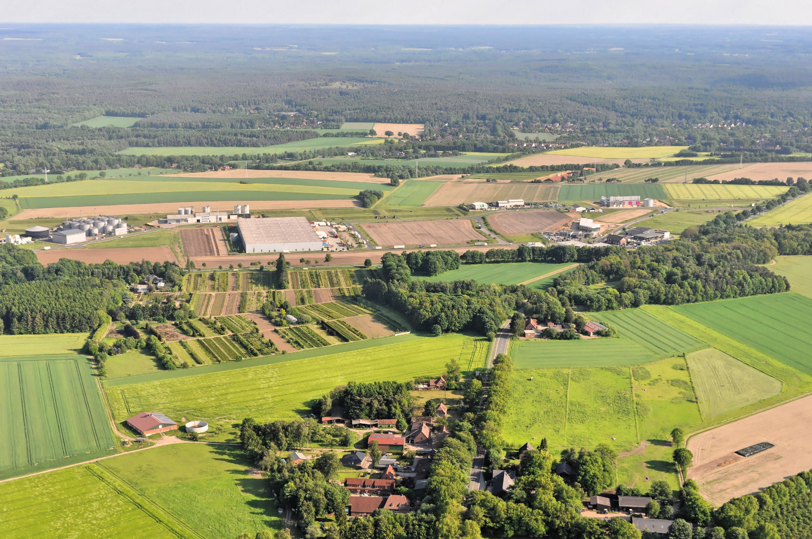 Überführungsflug vom Flugplatz Nordholz-Spieka über Lüneburg, Potsdam zum Flugplatz Schwarzheide-Schipkau